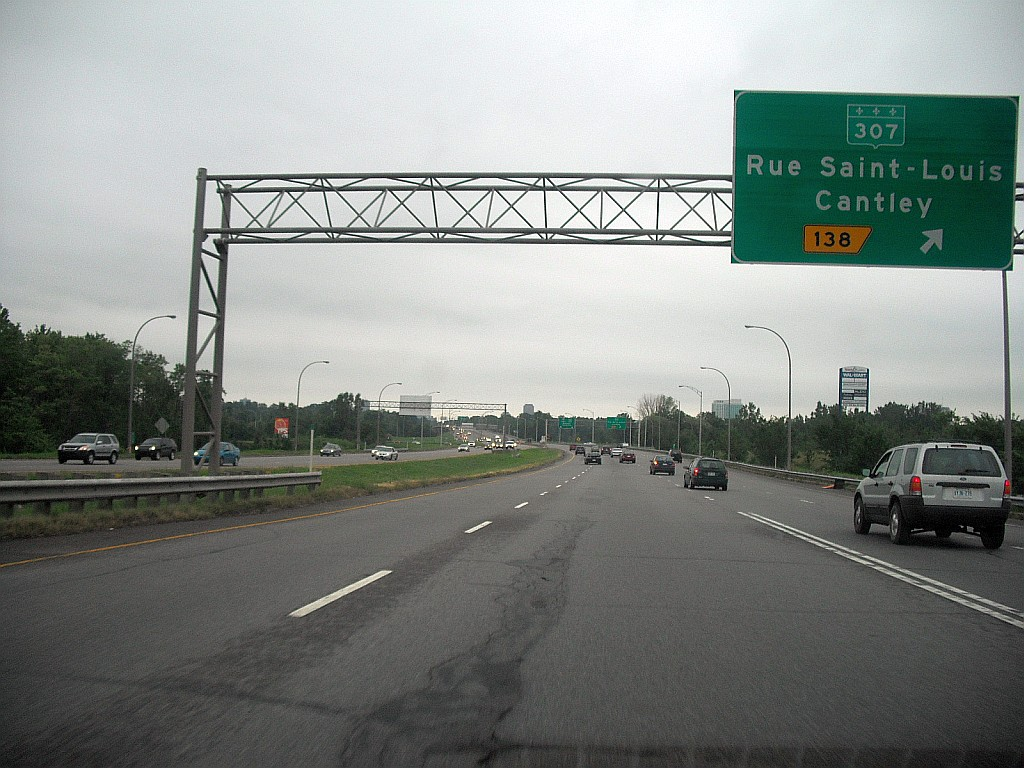 Vue sur l'autoroute 50 en direction de Gatineau, Québec, Canada.